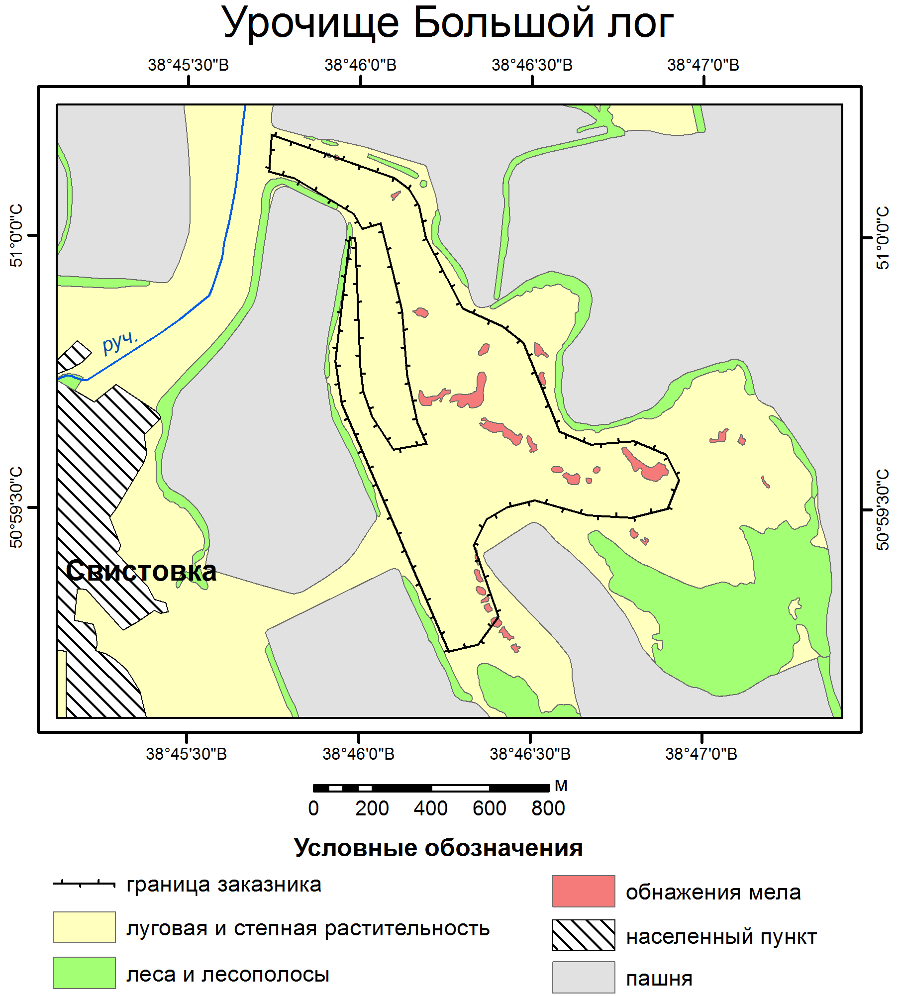 Карта урочища Большой лог. Белгородская область, Красненский район